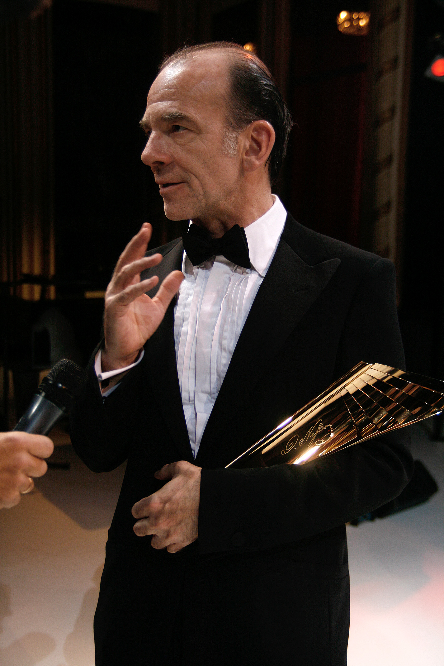 Martin Wuttke, ausgezeichnet als bester Schauspieler, bei der Verleihung des Nestroy-Theaterpreises 2010 im Burgtheater in Wien.